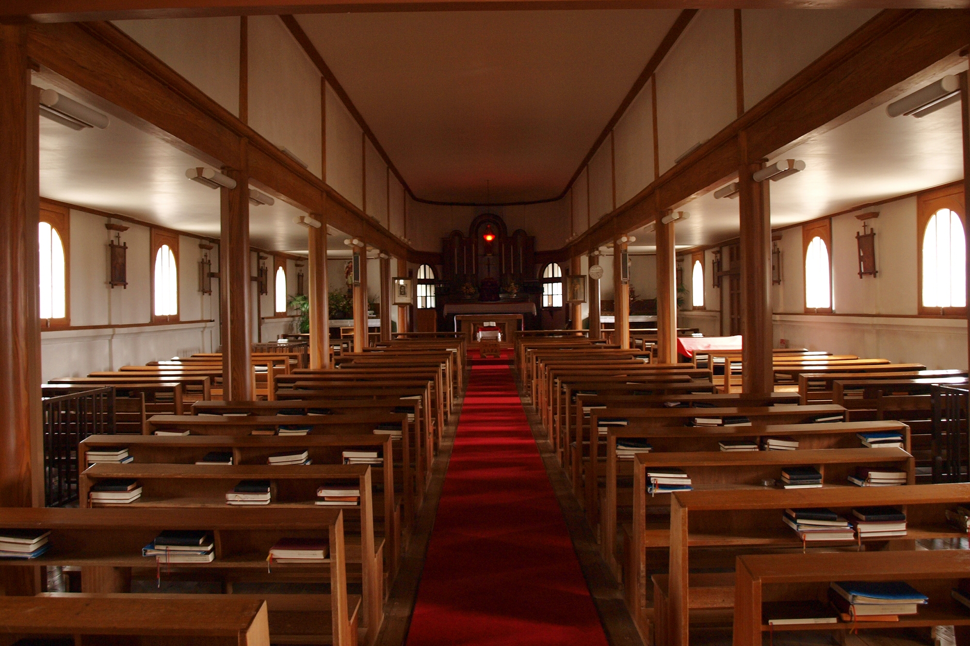 長崎県長崎市にある出津教会の内部